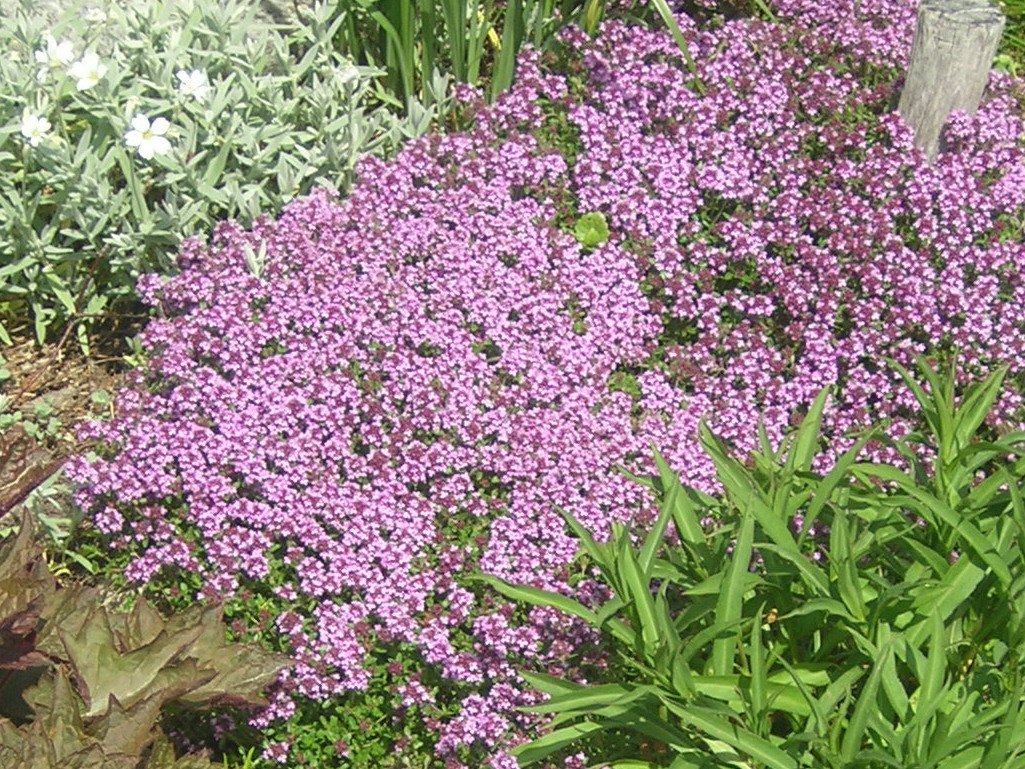 Thymus serpyllum, flowering plants. Russia, Ivanovskaya oblast', Savinskij rajon